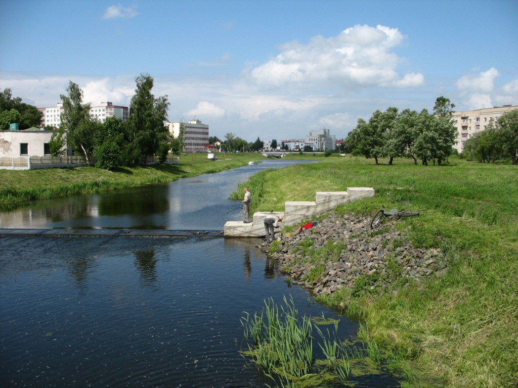 Streets (Slutsk, Belarus)